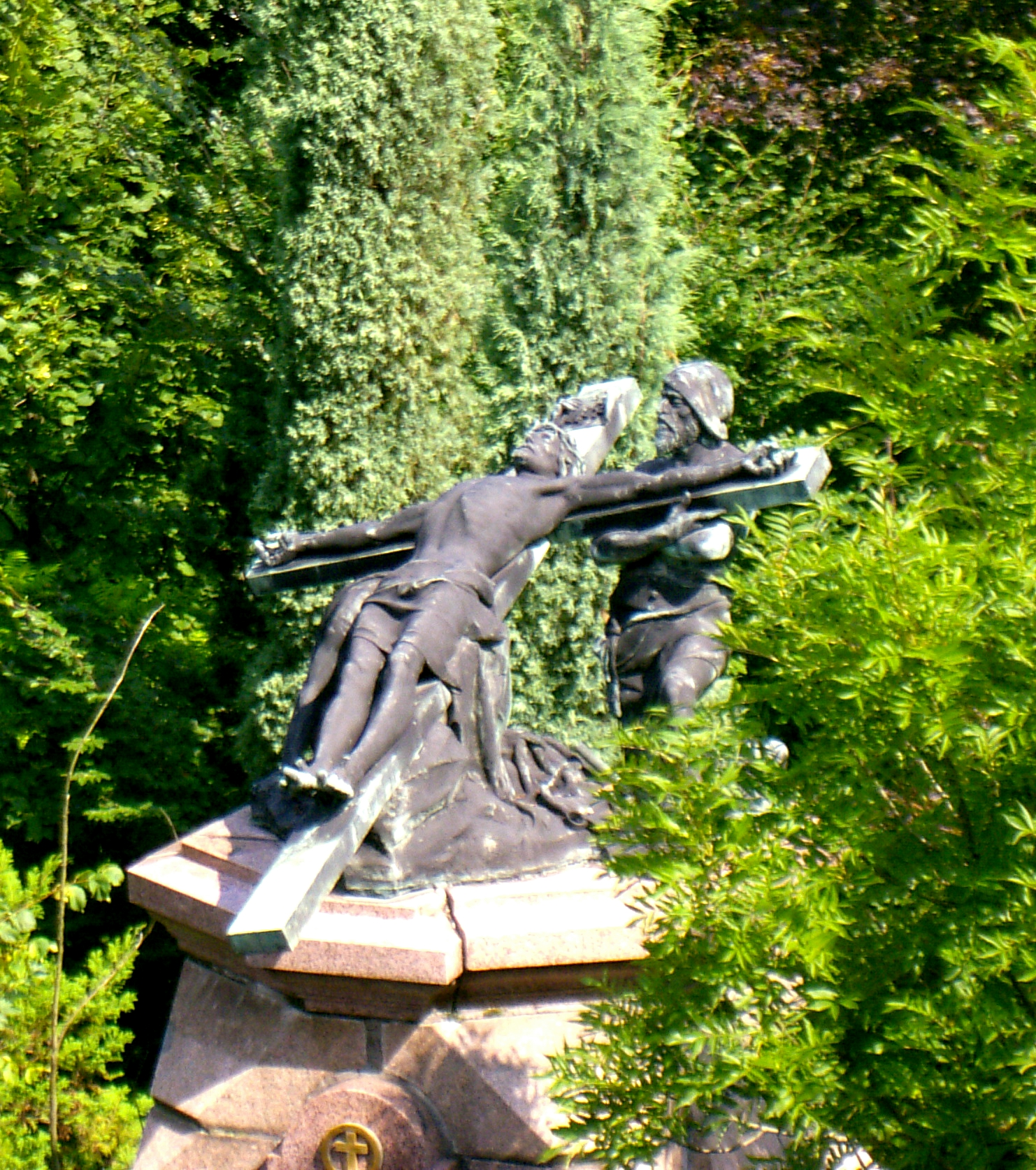 Jedna z kapliczek drogi krzyżowej na Jasnej Górze